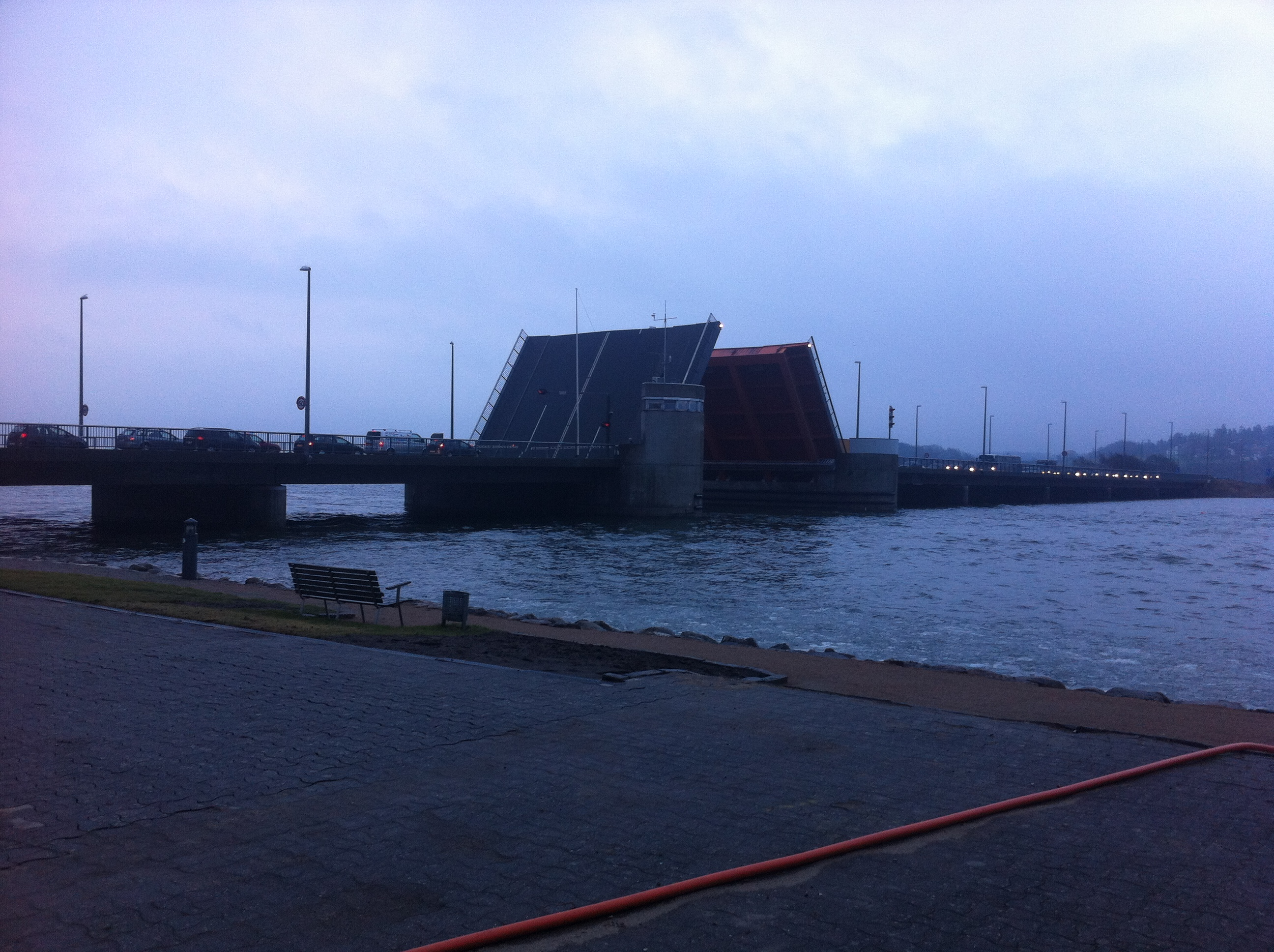 Hadsundbroen er åben, da et skib lige er passeret.